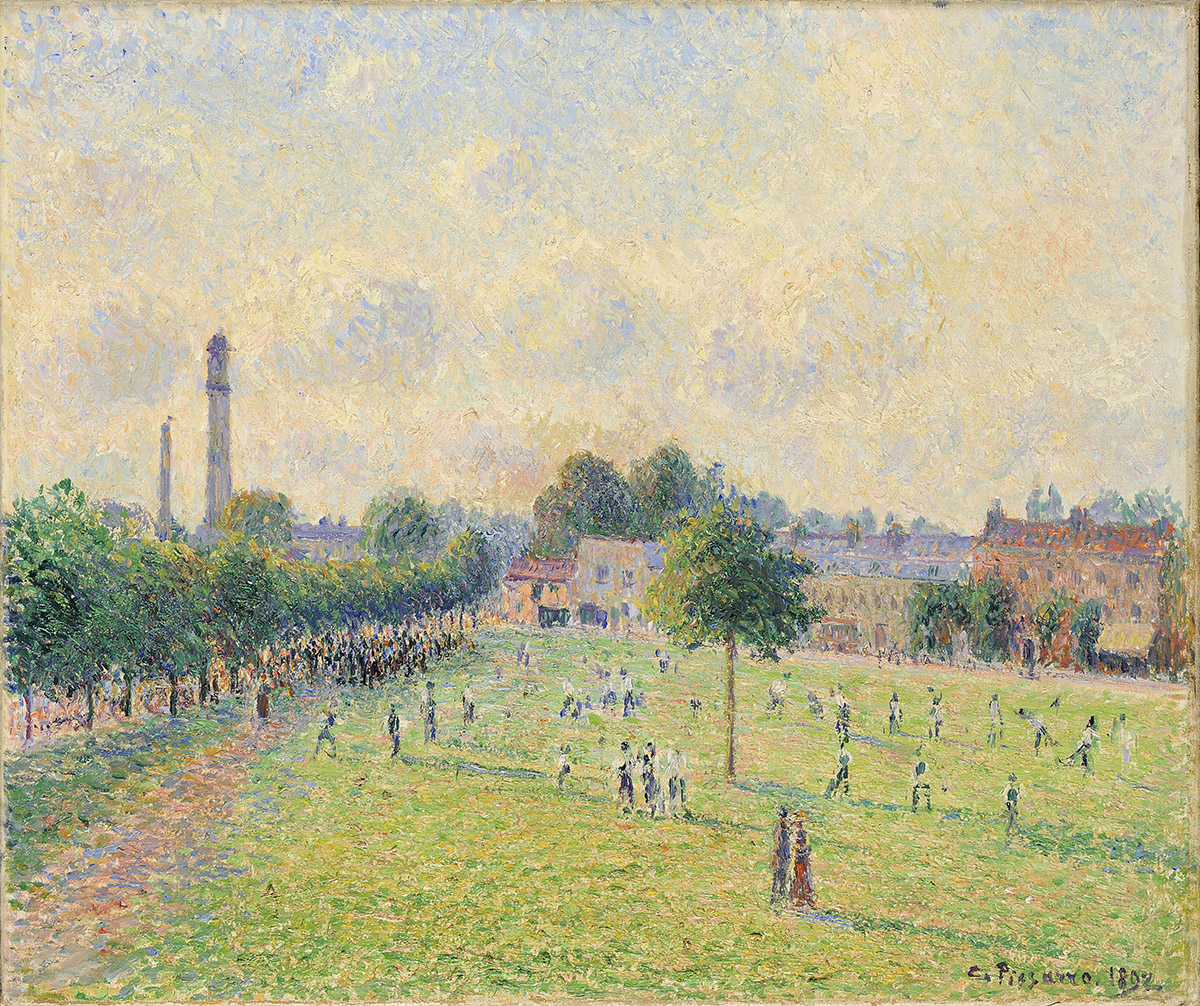 Camille Pissarro, Kewgreens